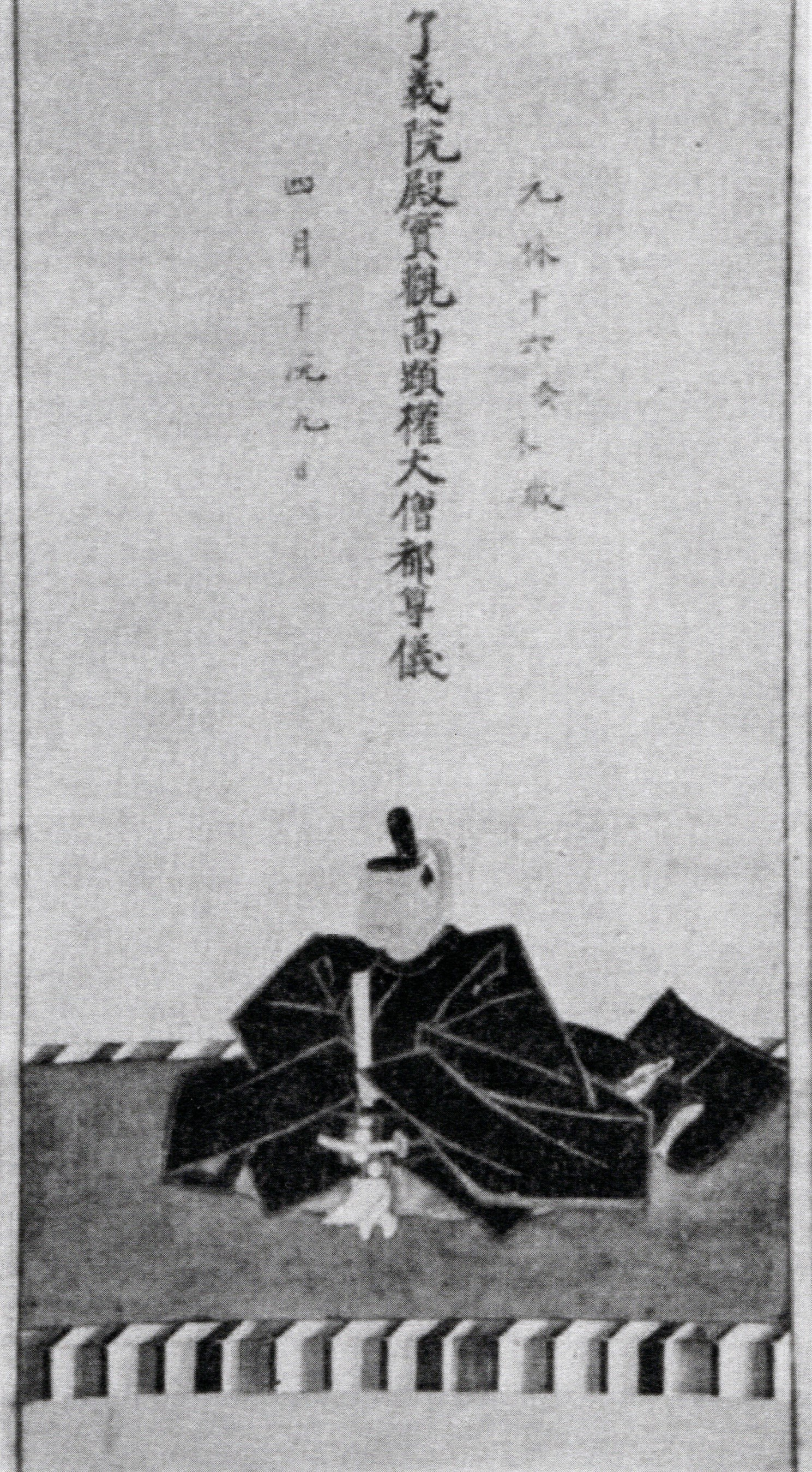 藤堂高久の肖像(モノクロ)。